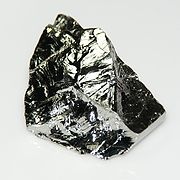 Германий